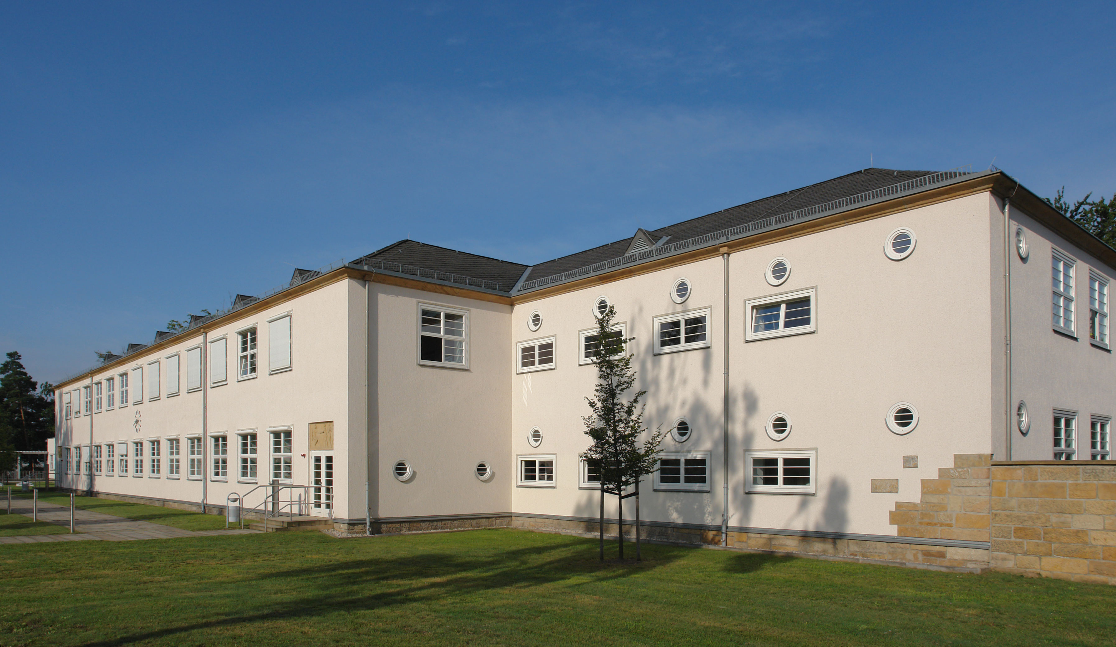 BG-Akademie Dresden